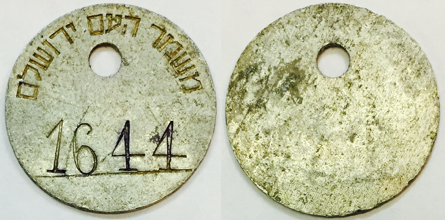 משמר העם ירושלים - דסקית מס' 1644